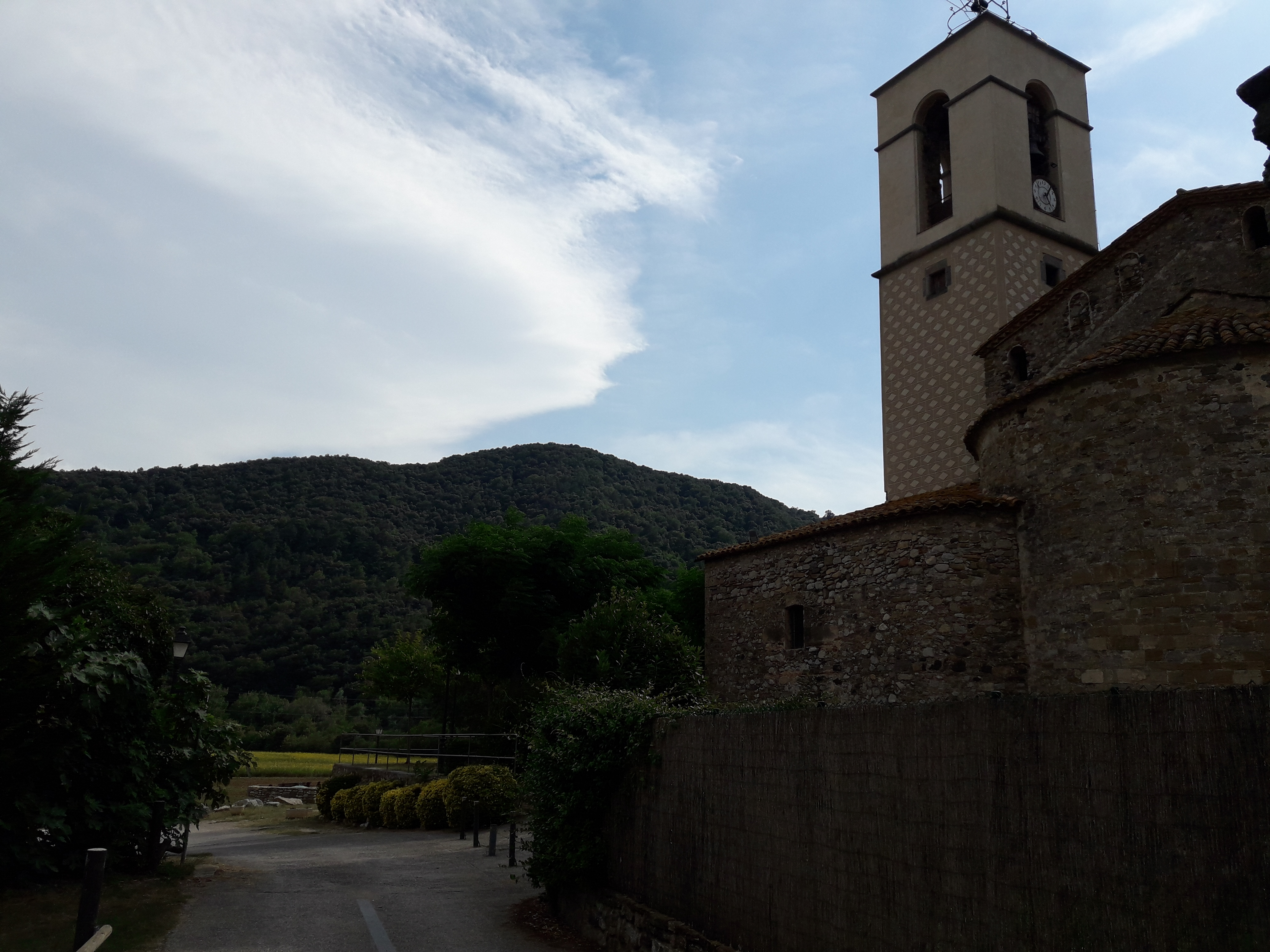 Argelaguer.